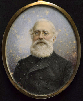 Dr. Julian Joseph Overbeck (1821-1905)